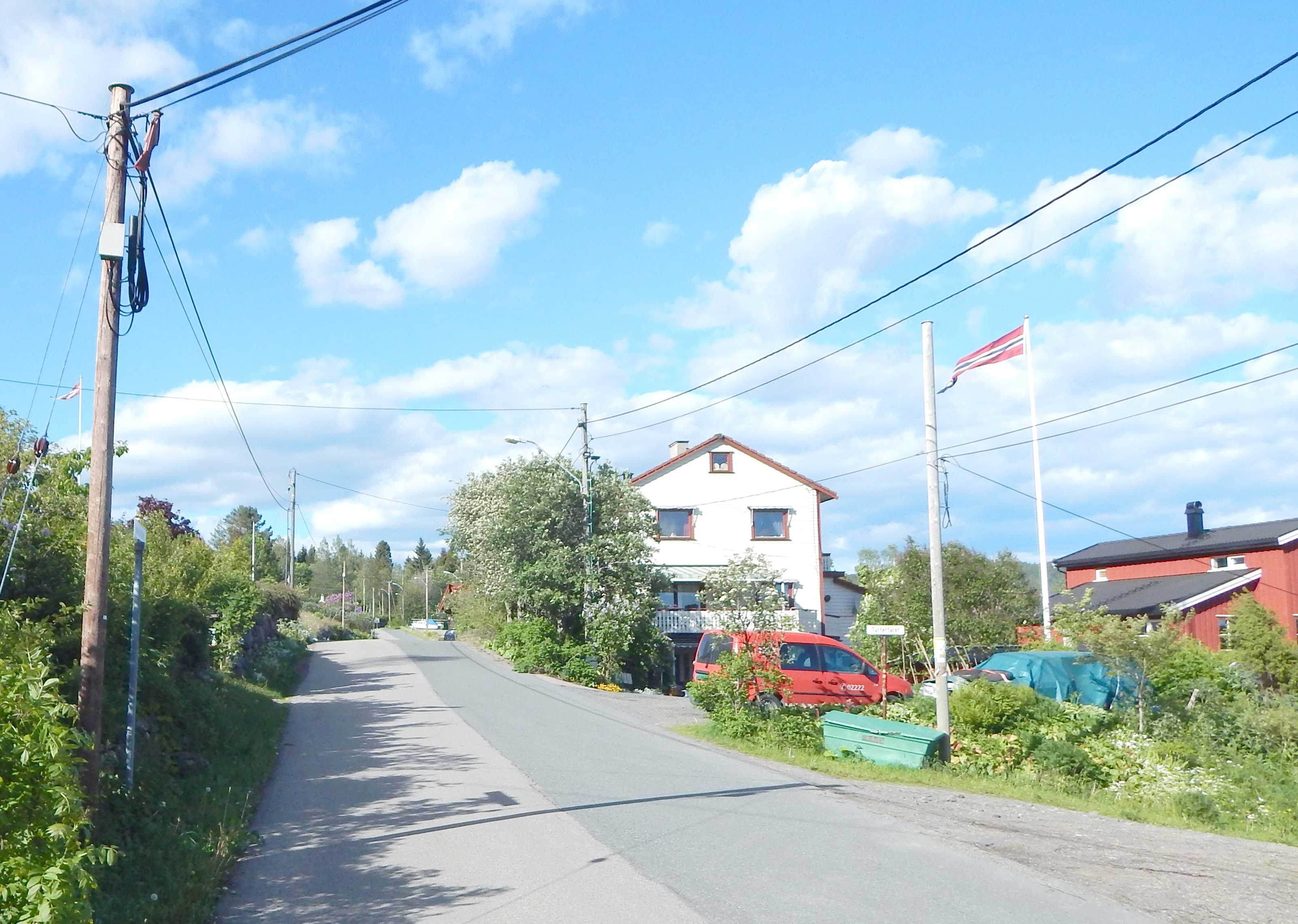 Gamle Maridalsvei ved Turterfaret